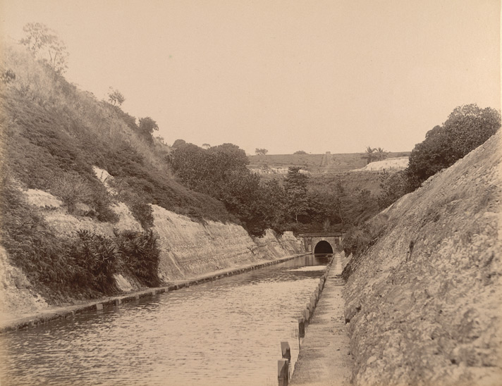 വർക്കല തുരപ്പ് 1900